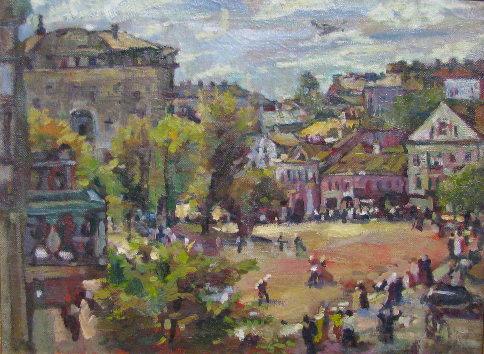 Мікалай Тарасікаў. Плошча Свабоды ў Мінску. Палатно, алей.